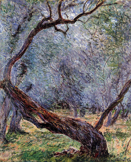 Olivi dipinti da Monet, presenti nel giardino di Villa Mariani